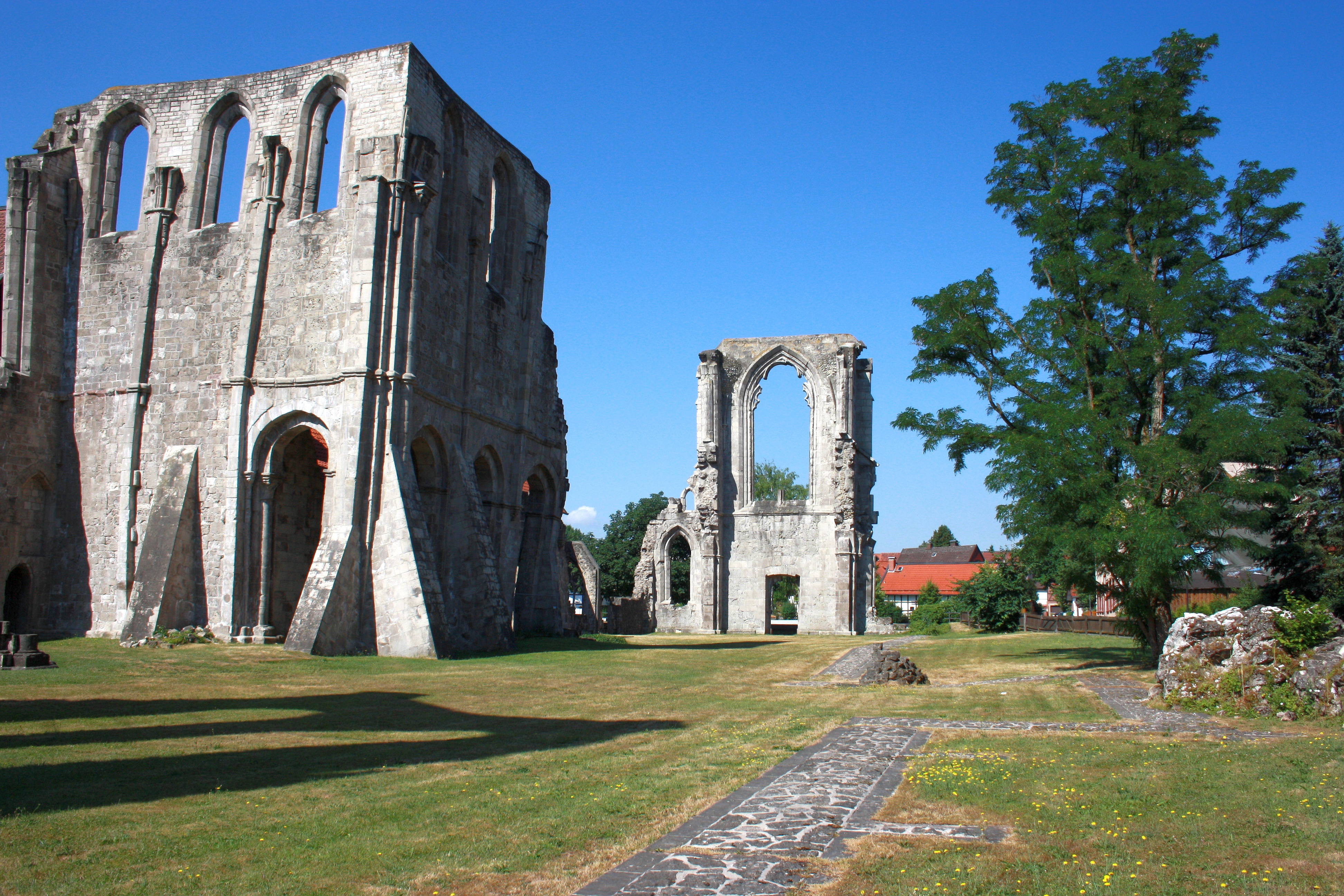 Zisterzienser Kloster Walkenried - südl. Harz Ruine Klosterkirche